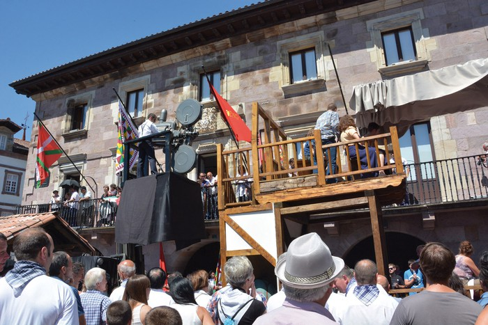 Ziga herriak 2017an 'Maitena zinea' orgarekin Elizondon lehen saria lortu zuen Baztandarren biltzarrean.